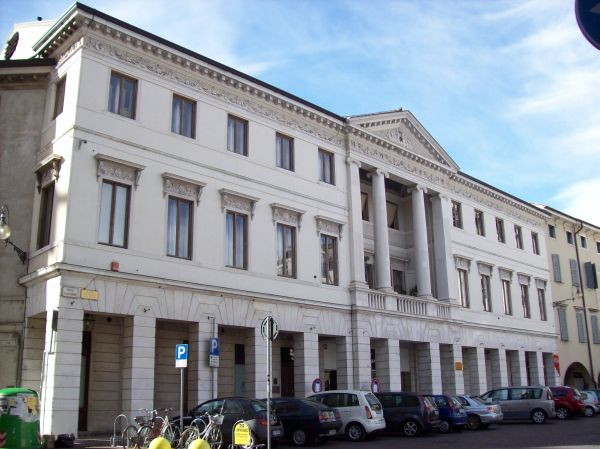 Udine (Friuli Venezia Giulia - Italy), Palazzo Antivari-Kechler